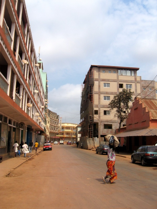 Street in Uíge, Angola